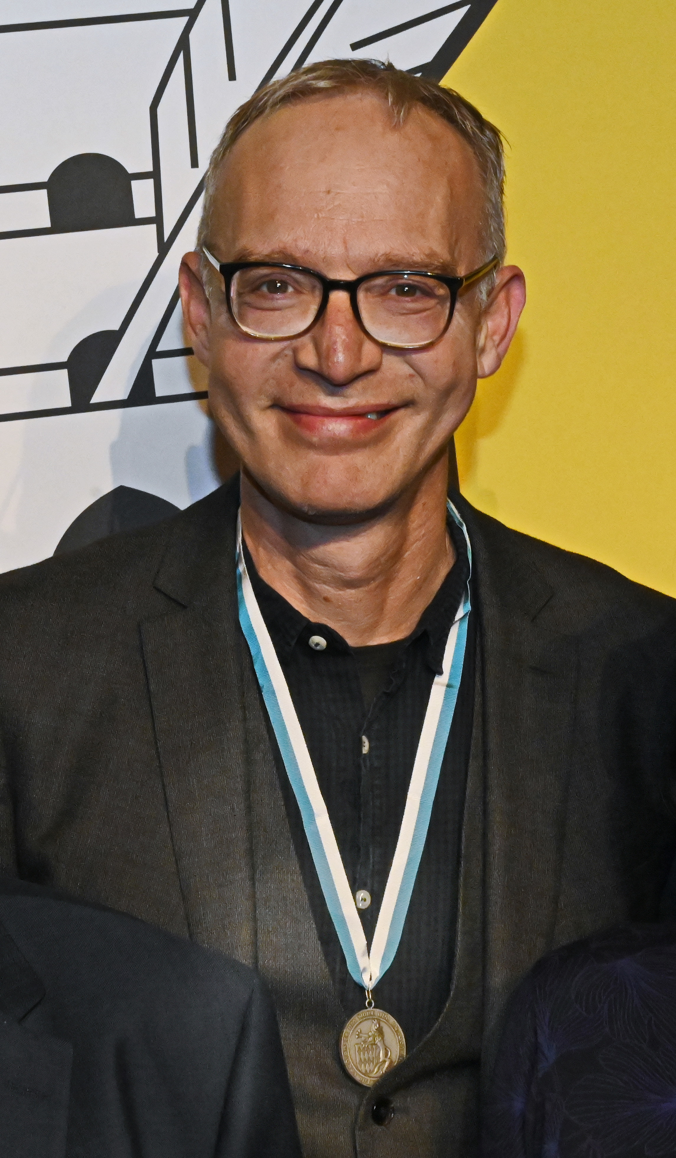 Christoph Süß, Bayerischer Poetentaler, 2019